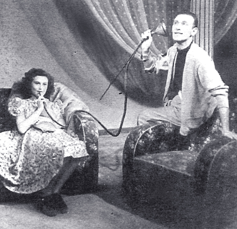 Adriana Benetti e Nunzio Filogamo in "C'è sempre un ma" (Zampa, 1943)